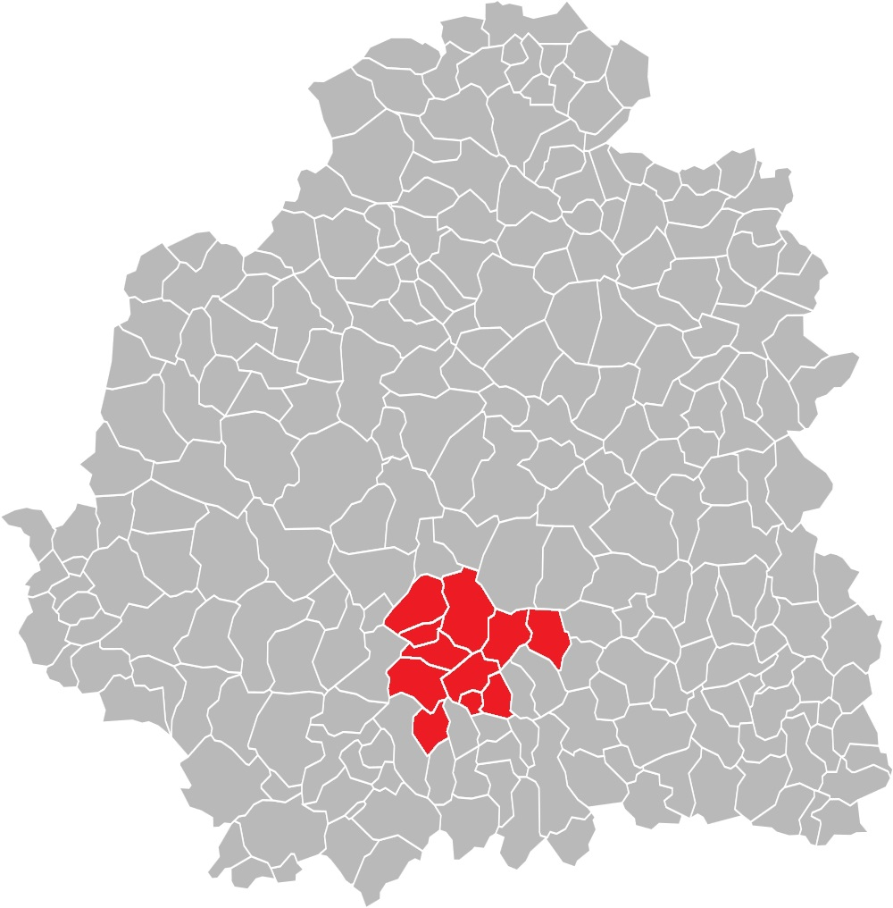 Carte des communes de l'Indre (36) : Le canton d'Argenton-sur-Creuse, de 1790 à 2015.